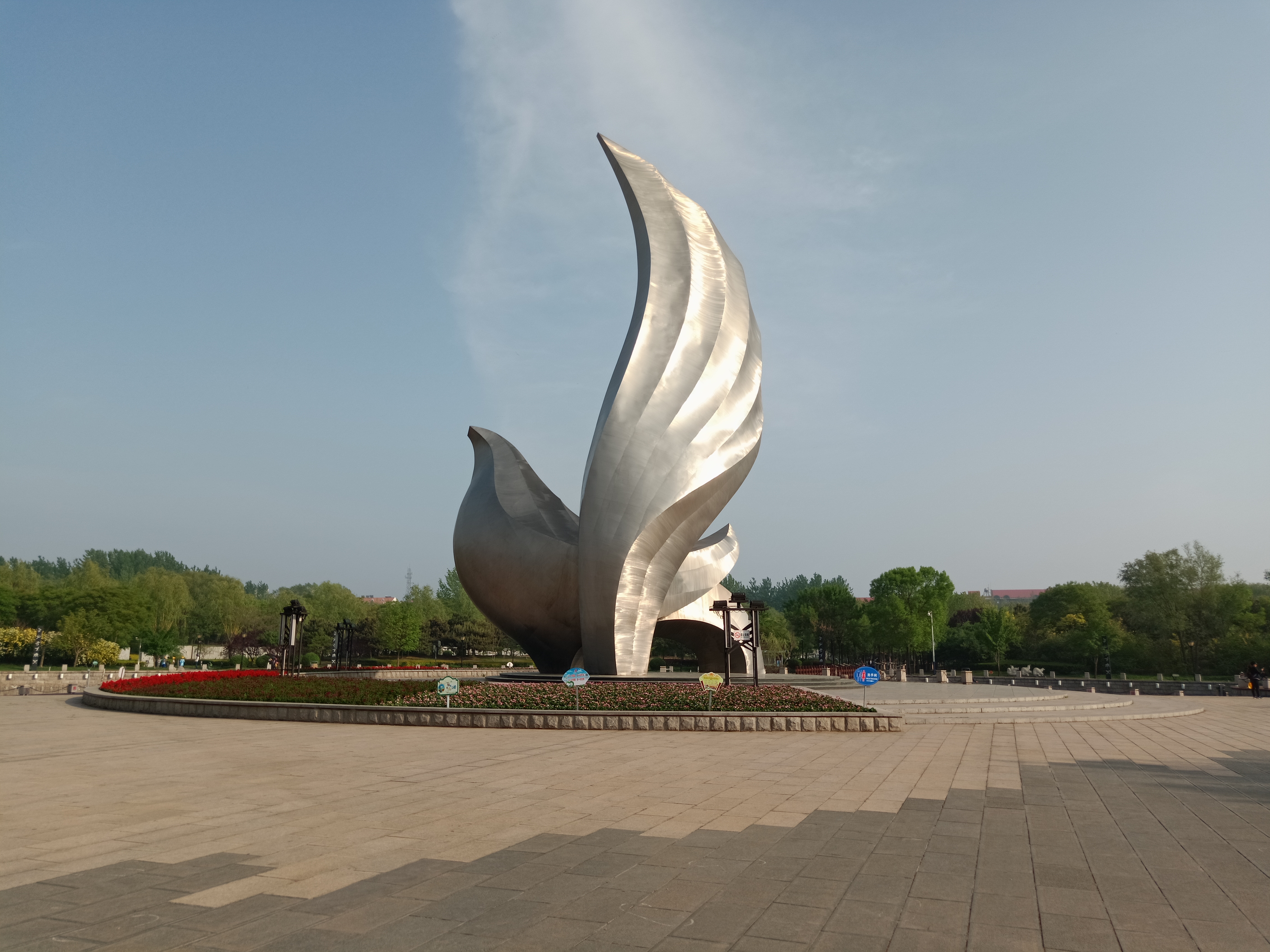 粵語: 北戴河奧林匹克大道公園嘅廣場主雕塑同音樂噴泉